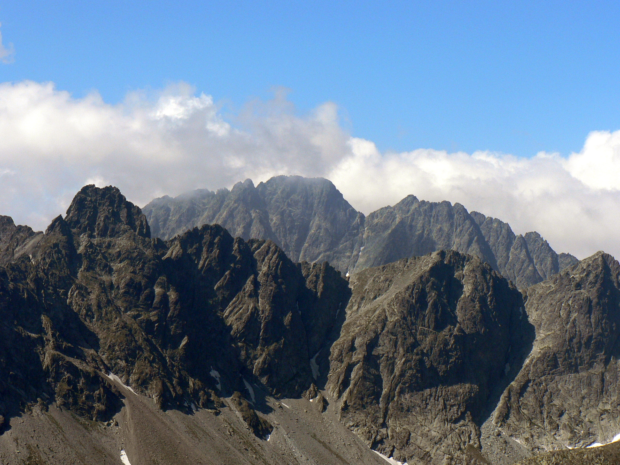 Staroleśny Szczyt, Baniasta Turnia i Mała Wysoka, za nimi Gerlach i Zadni Gerlach